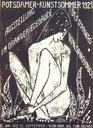 Plakat Potsdamer Kunstsommer 1921 von Otto Mueller aus dem Bestand des Potsdam Museums